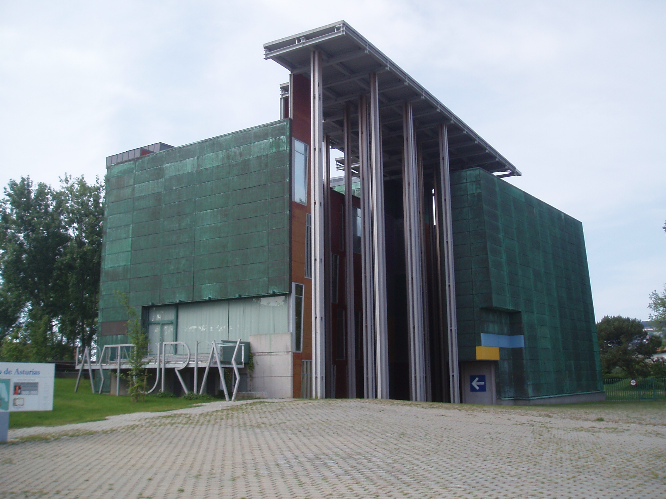 Edificio del Museo del Pueblo de Asturias, en Gijón (España)